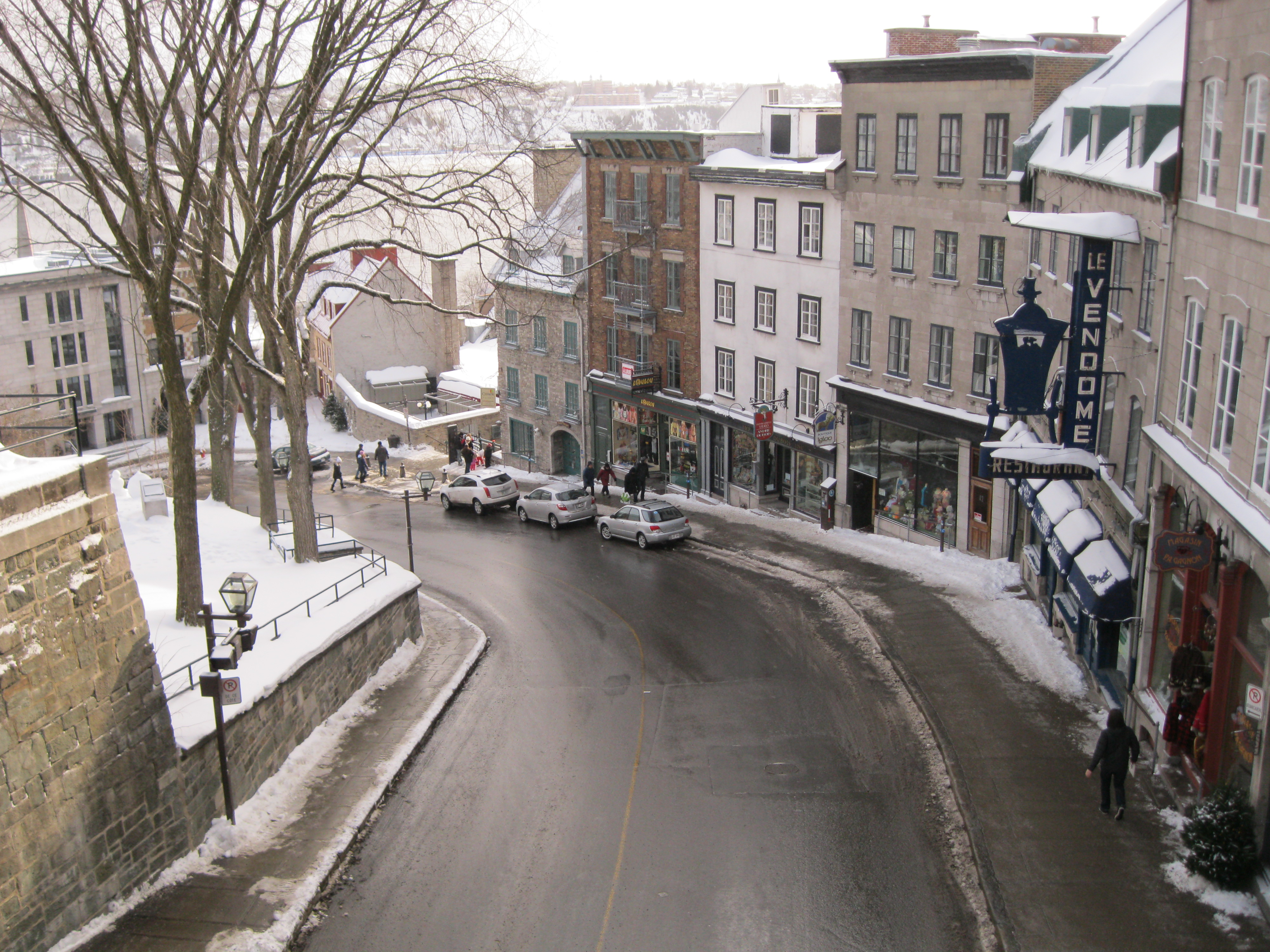 Côte de la Montagne, vue de la porte Prescott, Vieux-Québec